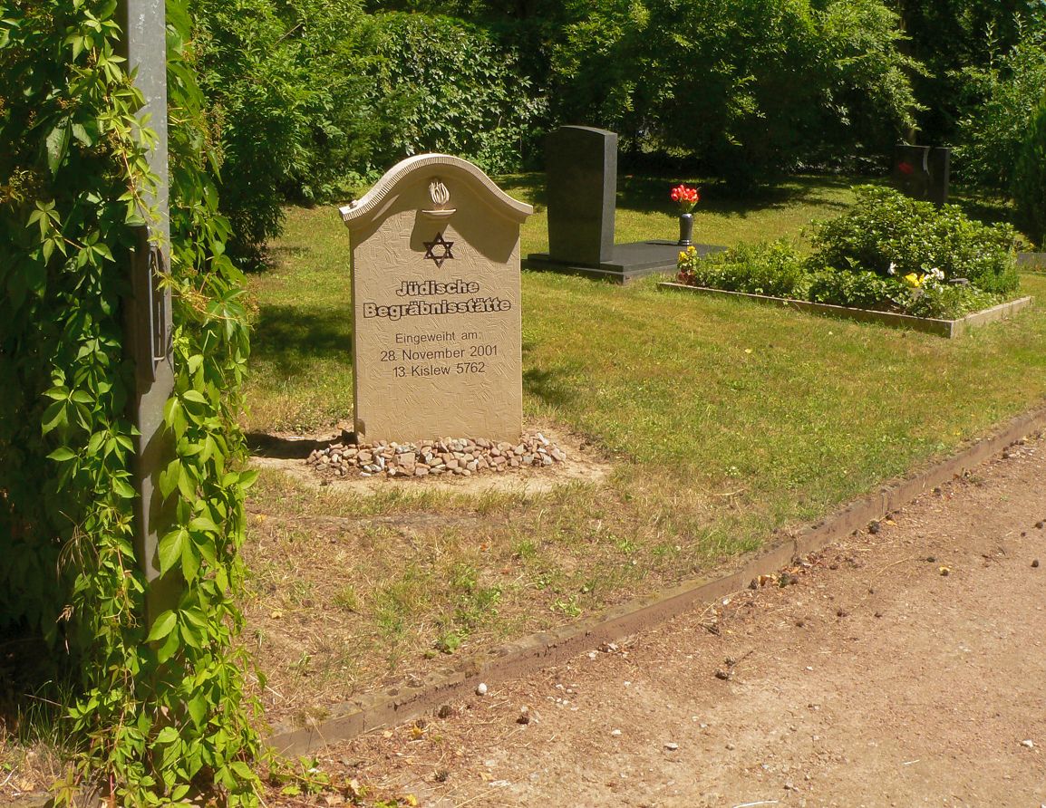 Jüdische Begräbnisstätte des Friedhof Am Wehl